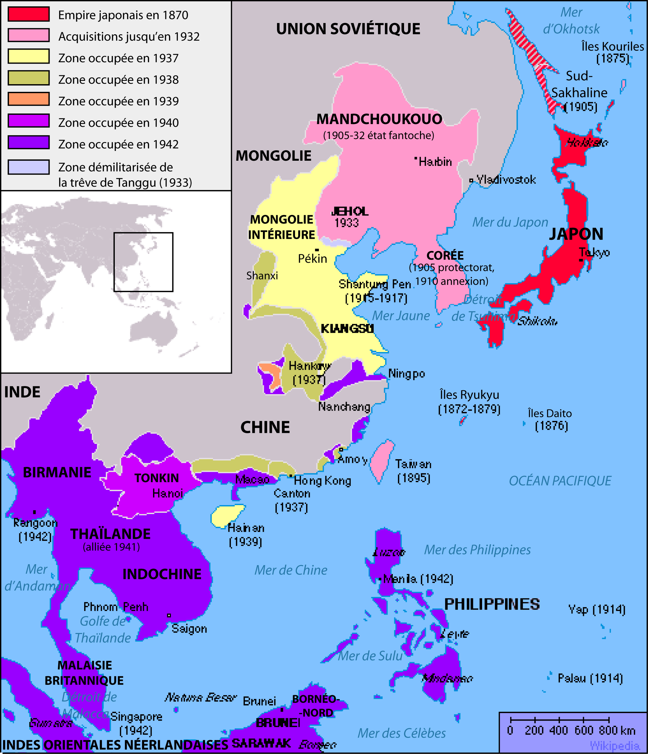 Japanese Empire